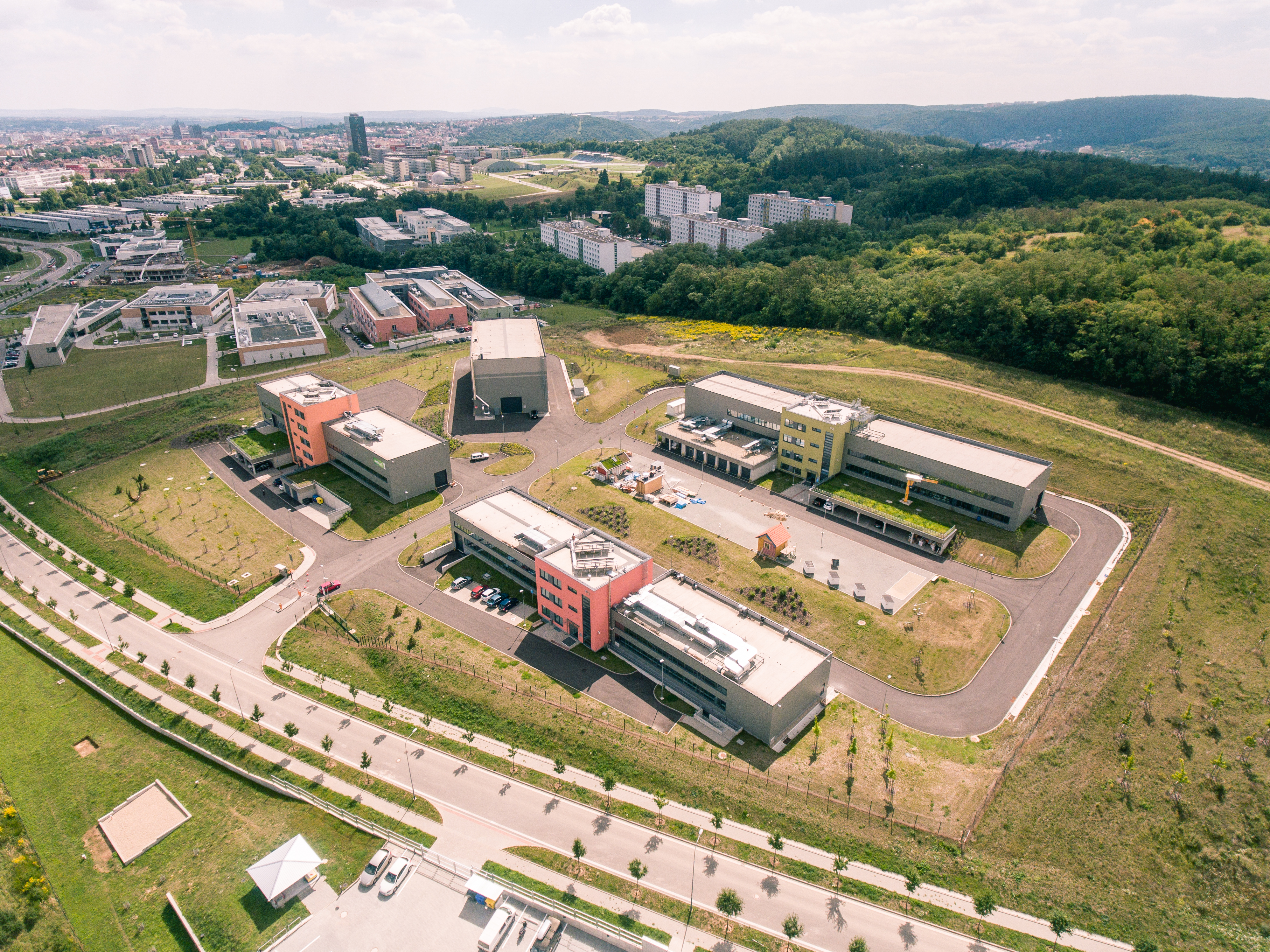 pohled na centrum AdMaS